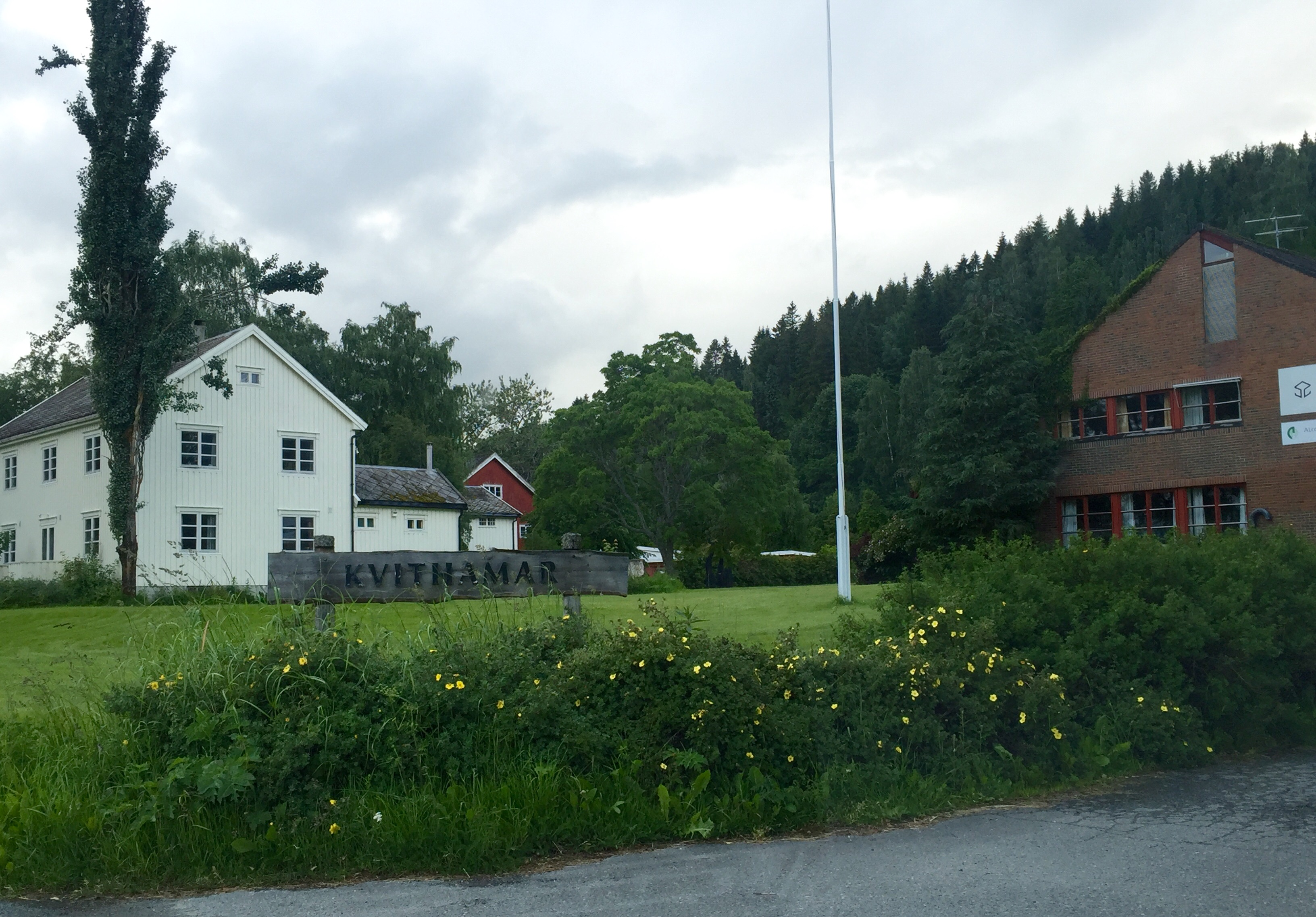 NIBIO (tidligere Statens forsøksgård for hagebruk) på Kvithammer i Stjørdal.